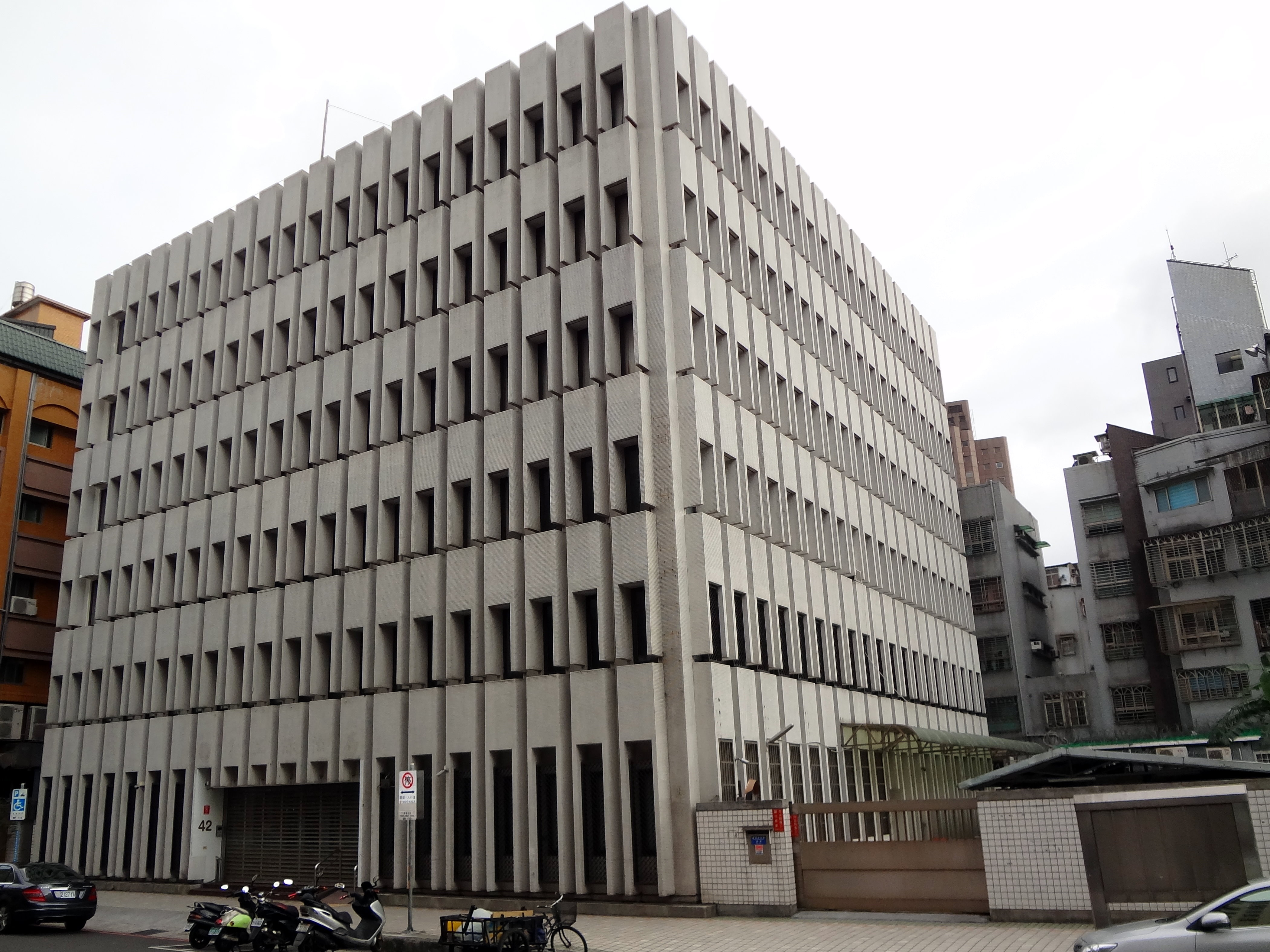 中華民國勞動部勞工保險局國民年金組，位於臺北市中正區濟南路二段42號。